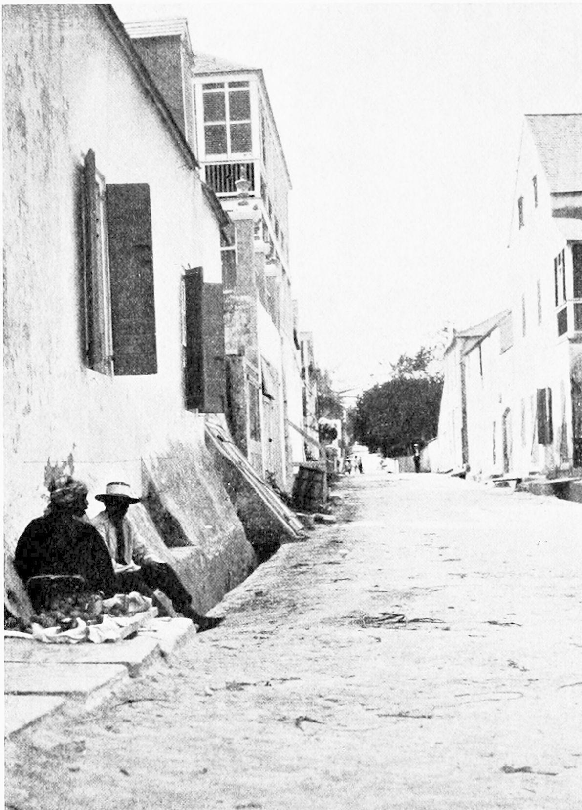 A street in Nassau